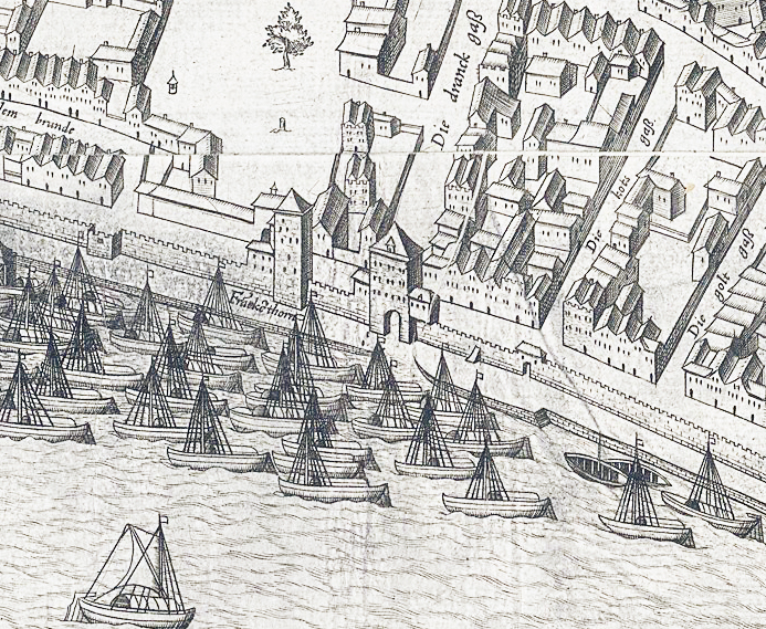 Ausschnitt des Mercator – Stadtplanes Köln. Bereich „Frankenwerft und Stadtmauer des dortigen Kölner Rheinufers